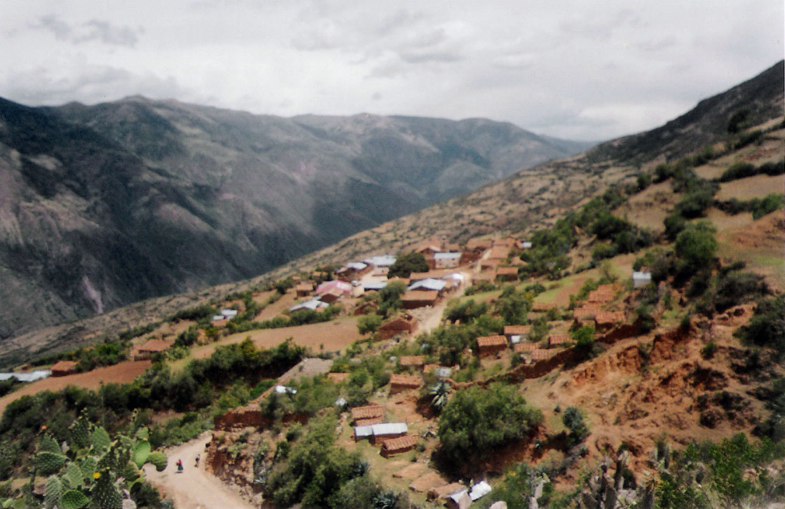 vista panoramica de Belén, se aprecia el cementerio y la plaza.